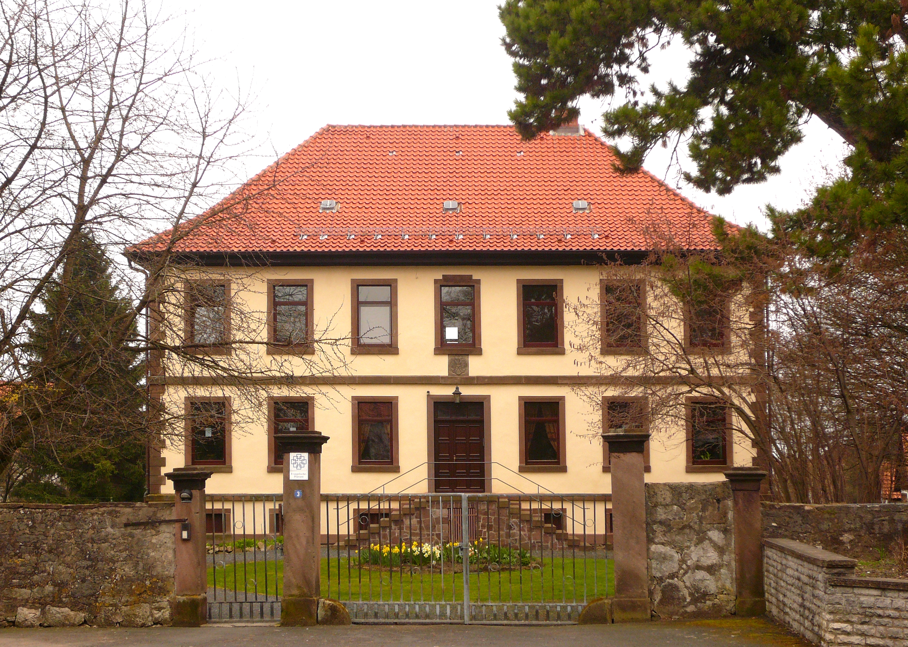 Pfarrhaus der ev.-luth. Kirchengemeinde St. Nicolai in Gladebeck, Stadt Hardegsen, Niedersachsen. Ehemaliges Herrenhaus des Ritterguts v. Bodemeyer, erbaut 1840, seit 1861 nach Auflösung des Ritterguts im Besitz der Kirchengemeinde